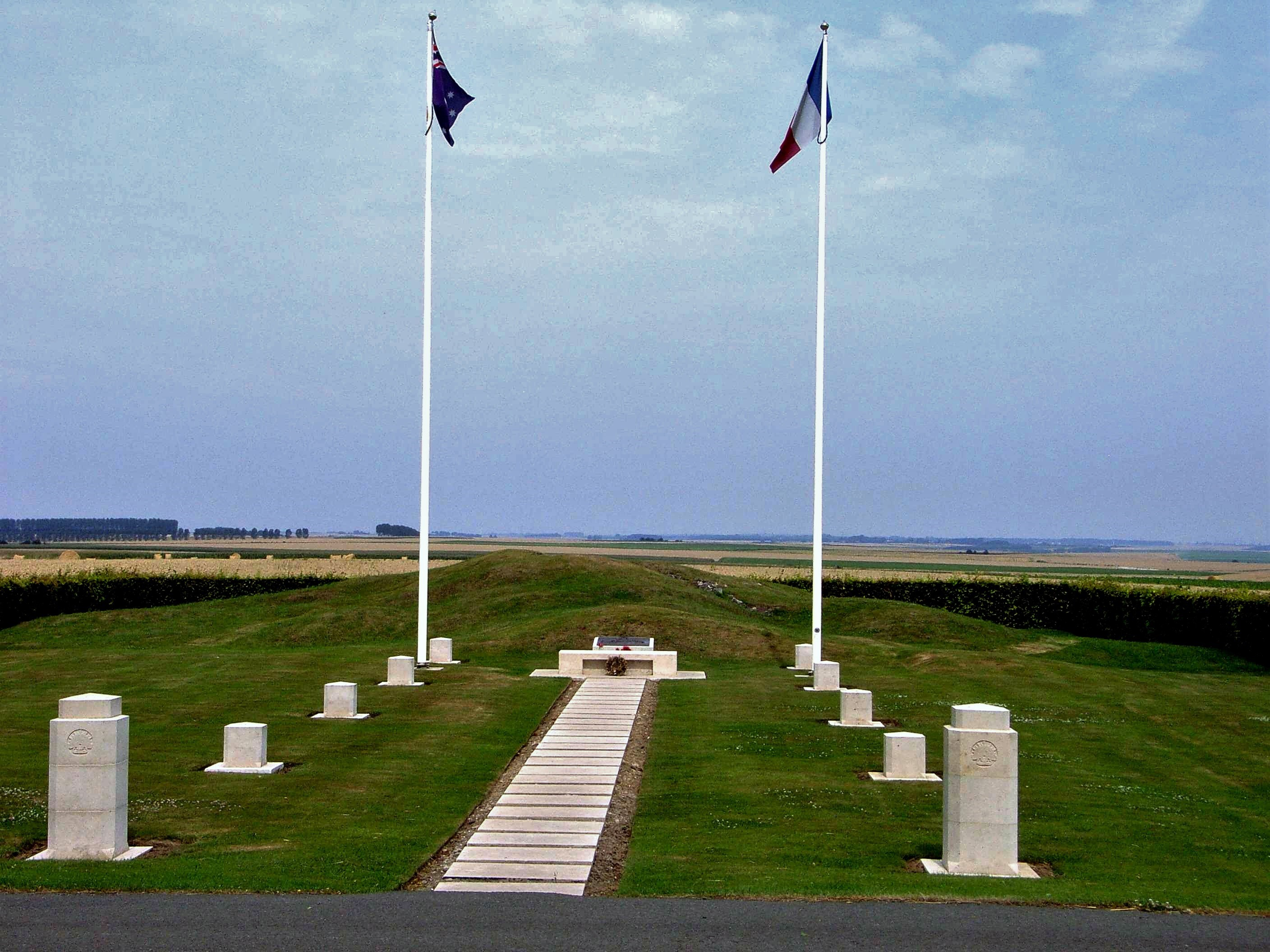 Common-Bild grafisch aufgearbeitet Originalbeschreibung: Windmillsite near Pozières (Fr), Memorial for the Battle of the Somme 1916